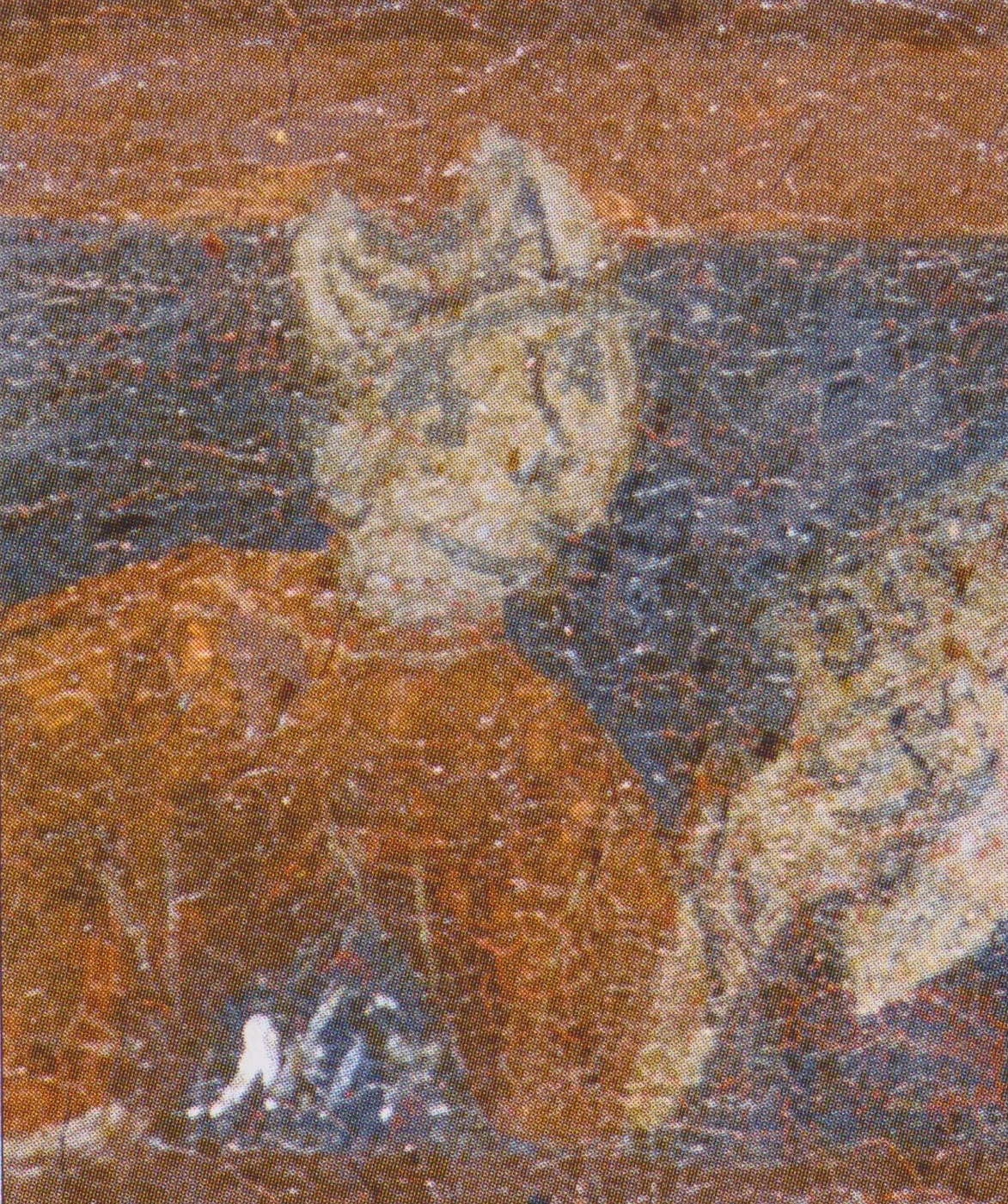 Jób esztergomi érsek korabeli ábrázolása az esztergomi székesegyház főkapuján (porta sepciosa)